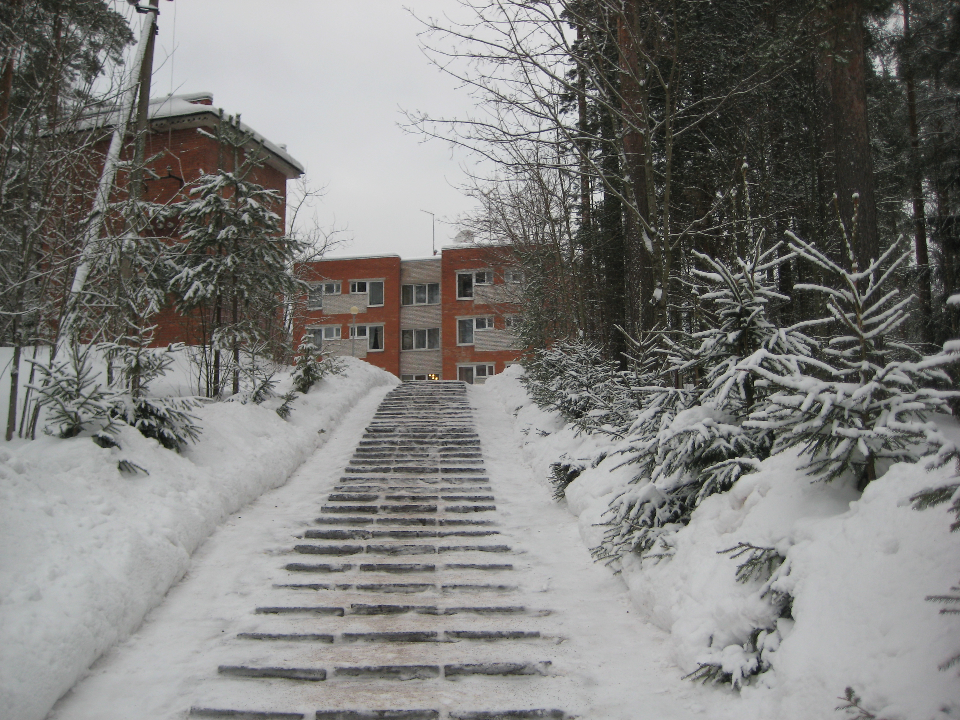 Ленинградская область. Пансионат "Ольшаники" (Выборгский район)